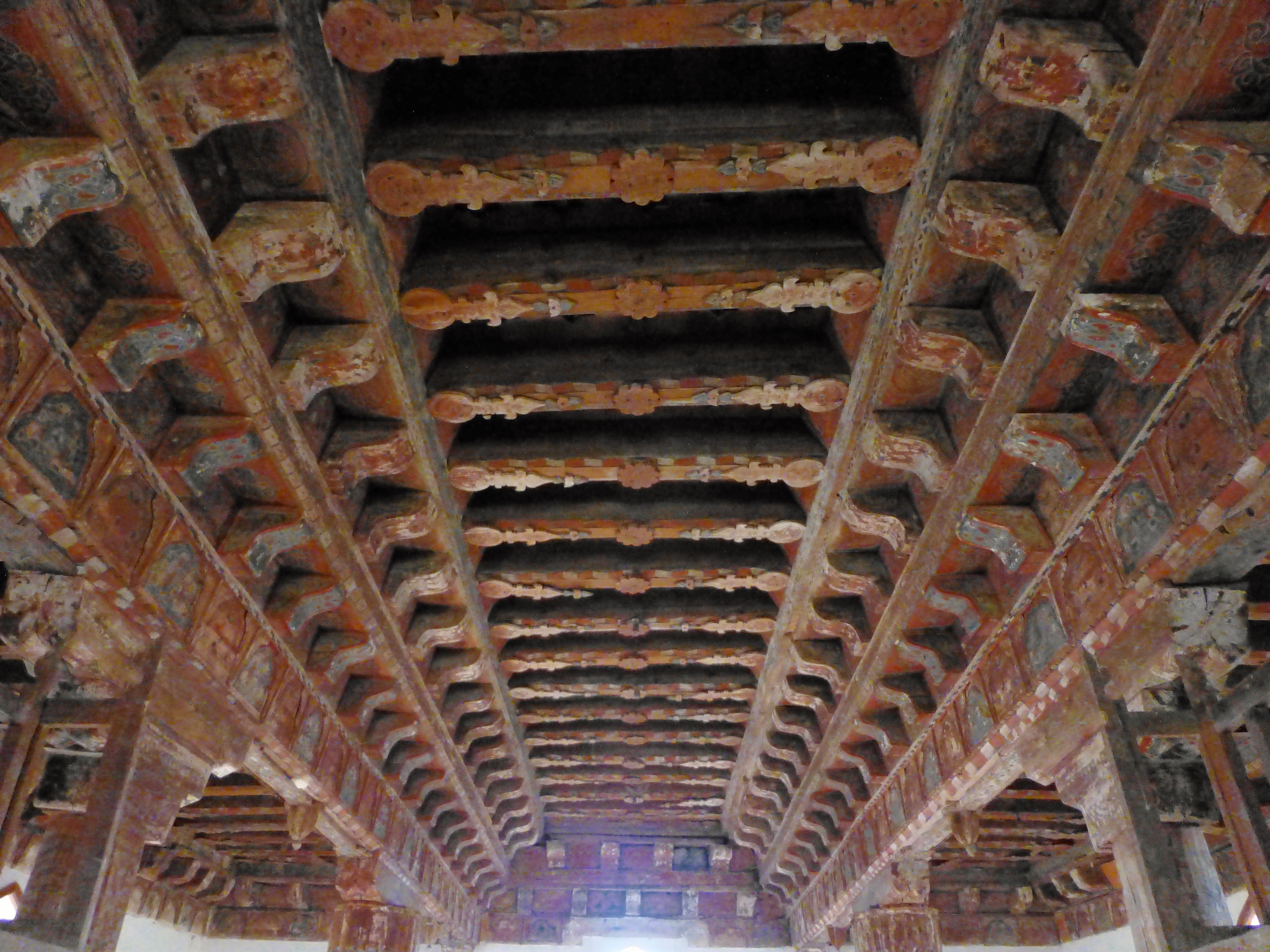 Kastamonu Kasaba köyü, Mahmutbey Camii, Çivisiz camii